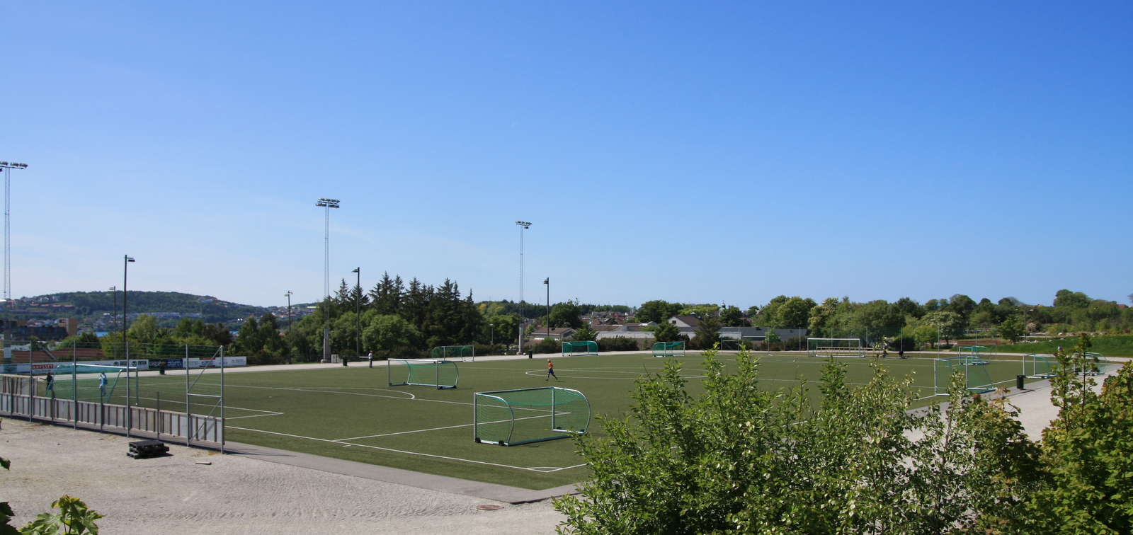 Hundvåg Stadion